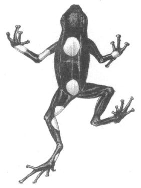 Illustration faite par Berthold en 1846 d'une Dendrobates histrionicus, aujourd'hui appelée Oophaga histrionica.